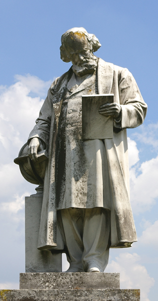 Photo de la sculpture en pied de Jules Janssen, face à l'observatoire de Meudon. Cette statue a été érigée en 1920. À l'origine son socle comportait des plaques en bas-relief aujourd'hui disparues: "le char d'Apollon passant devant le soleil éclipsé" et "Jules Janssen s'échappant de Paris assiégé en ballon". Cliché personnel libre de droits. Rien ne permet d'identifier l'auteur de la sculpture. On peut supposer que, vu l'âge, l'œuvre est dans le domaine public.